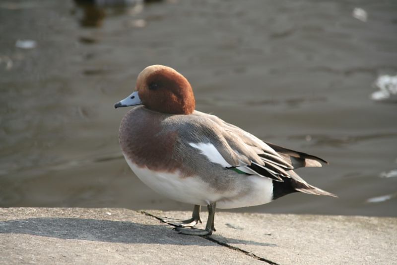 Eurasian Wigeon, male, Nov. 2005, Yokohama JAPAN ; Japanese description:ヒドリガモ オス 2005年11月 横浜市金沢区 (投稿者自身による撮影)